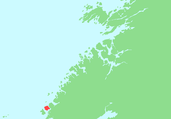 Locator map of Stokkøya, Sør-Trøndelag, Norway